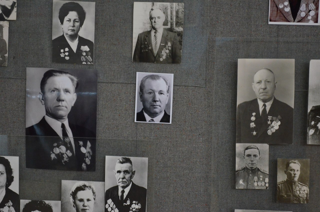 В экспозиции краеведческого музея на "волнах памяти".